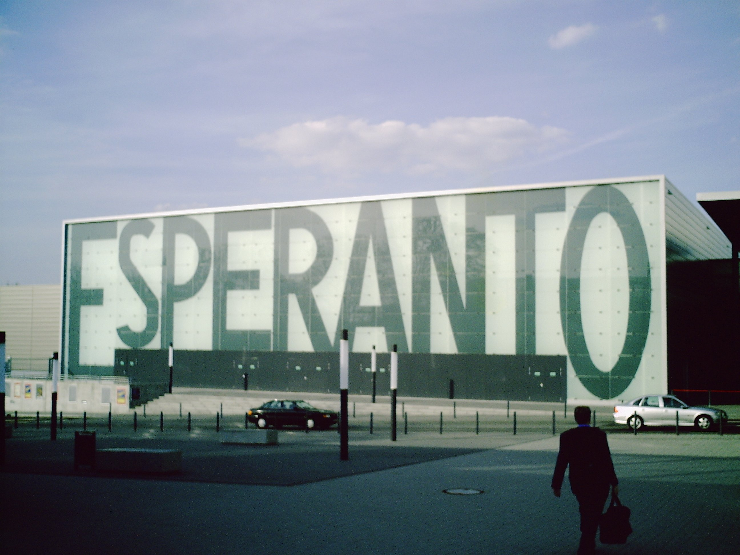 Das Hotel und Kongresszentrum Esperanto in Fulda.